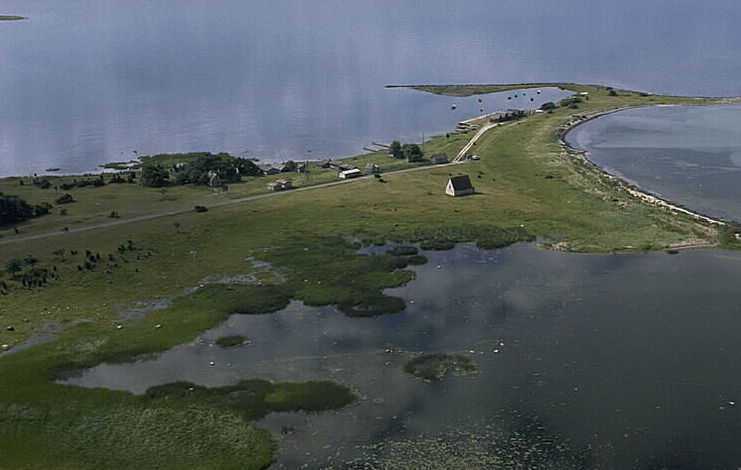 Motiv: Kovik fiskeläge Nyckelord: Flygbilder, Riksintressen Kategori: FiskelägeKovik fiskeläge